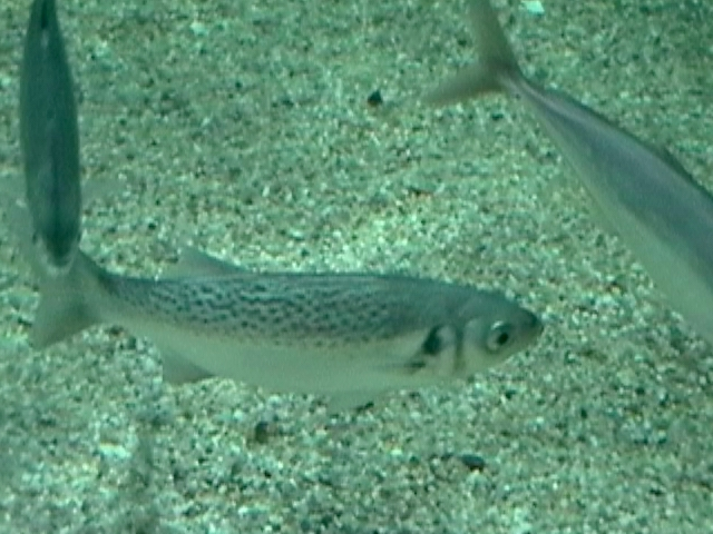 Baila (Dicentrarchus punctatus) Se trata de una especie muy parecida a la lubina pero de menor tamaño,el dorso más azulado, el cuerpo más rechoncho, con el ojo más desarrollado, espinas del opérculo más marcadas, y escamas más grandes. Presentan el dorso cubierto de pequeñas manchas oscuras. Pueden alcanzar los setenta cent&icute;metros de longitud y los seis kilogramos de masa. Es un depredador costero, que se distribuye por el Atlántico, desde Marruecos la canal de la Mancha, y por el Mediterráneo, siendo bastante coún. Procedencia: LOceanografic (Valencia)